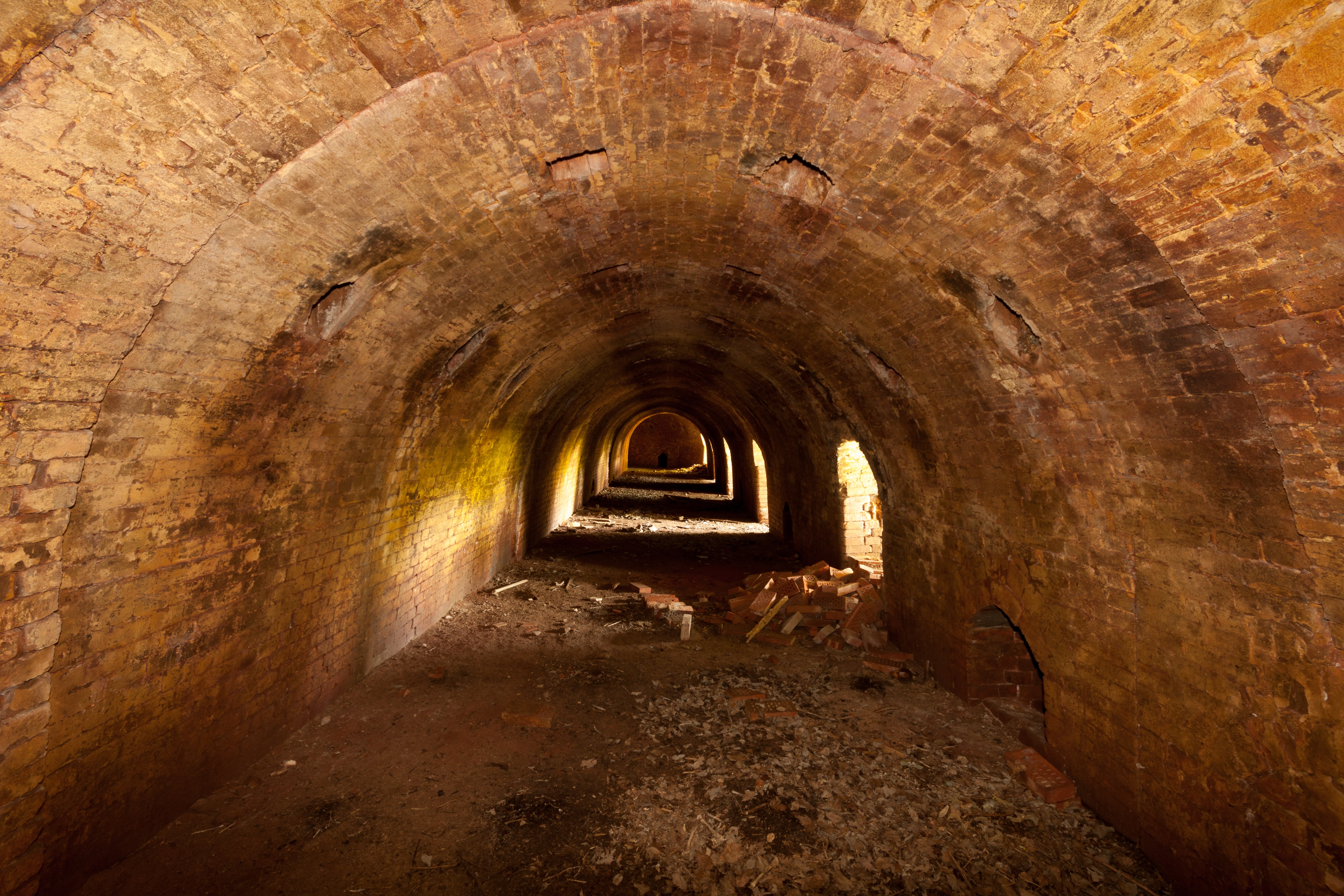 Ringofen der stillgelegten Ziegelei von Uttum